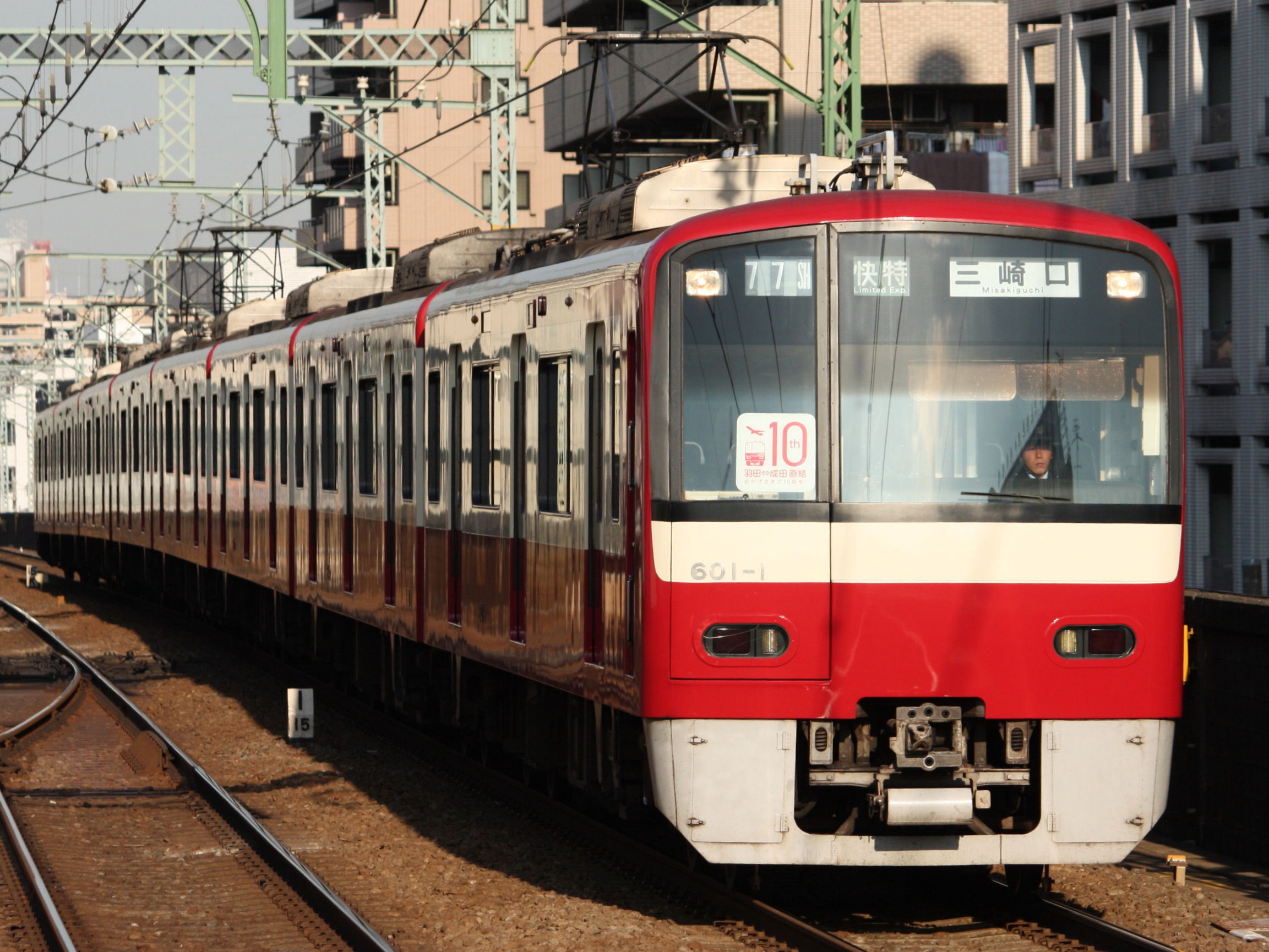 京急600形（3代） 1次車 京急鶴見にて